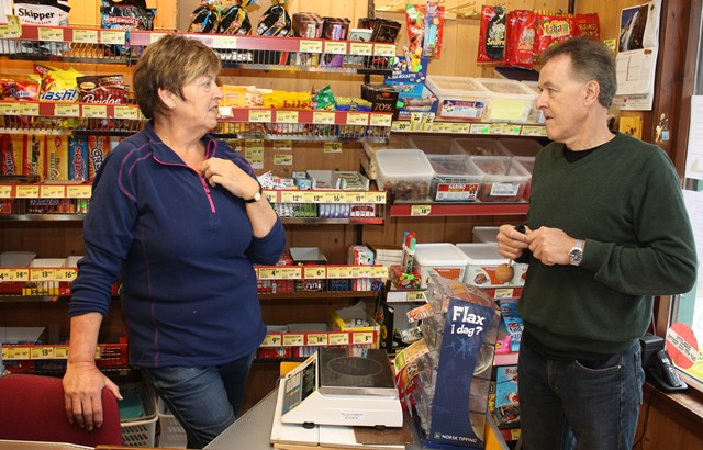 Merkur-advisor Ronny Mowatt (right)